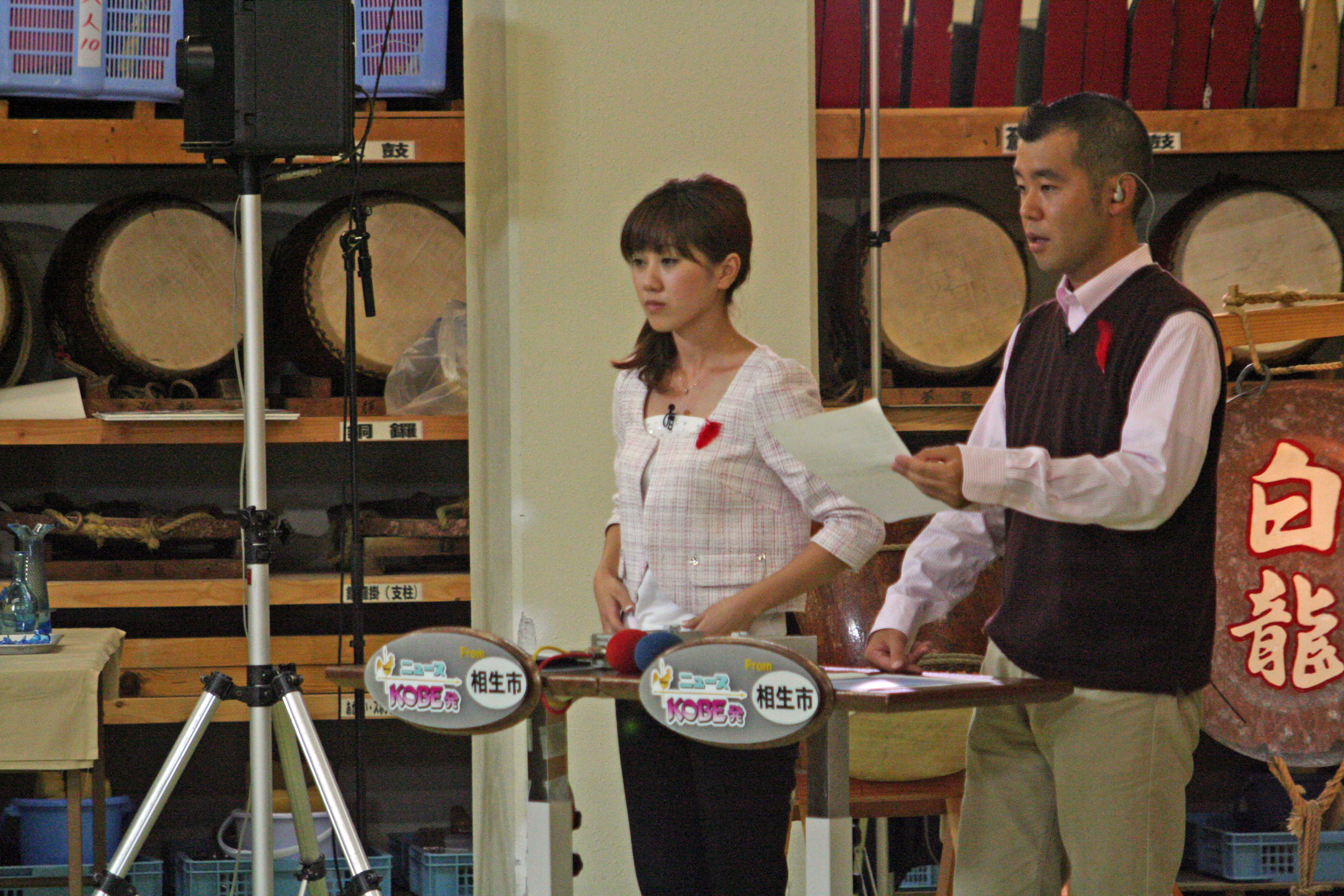 2009年9月29日から10月1日にかけて行なわれたNHK神戸のテレビ実況中継キャラバンによるテレビ収録の様子。キャラバンの司会者は今城和久と久保静。最終中継地である相生市内の相生ペーロン城にて撮影。